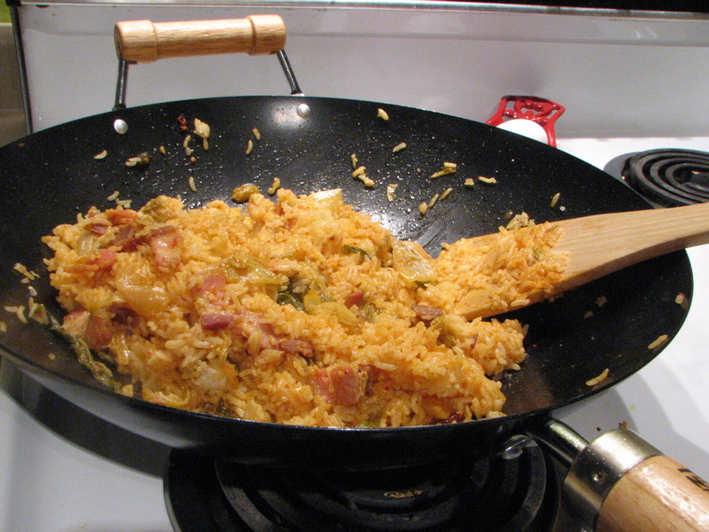 Kimchi bokkeumbap, kimchi fried rice